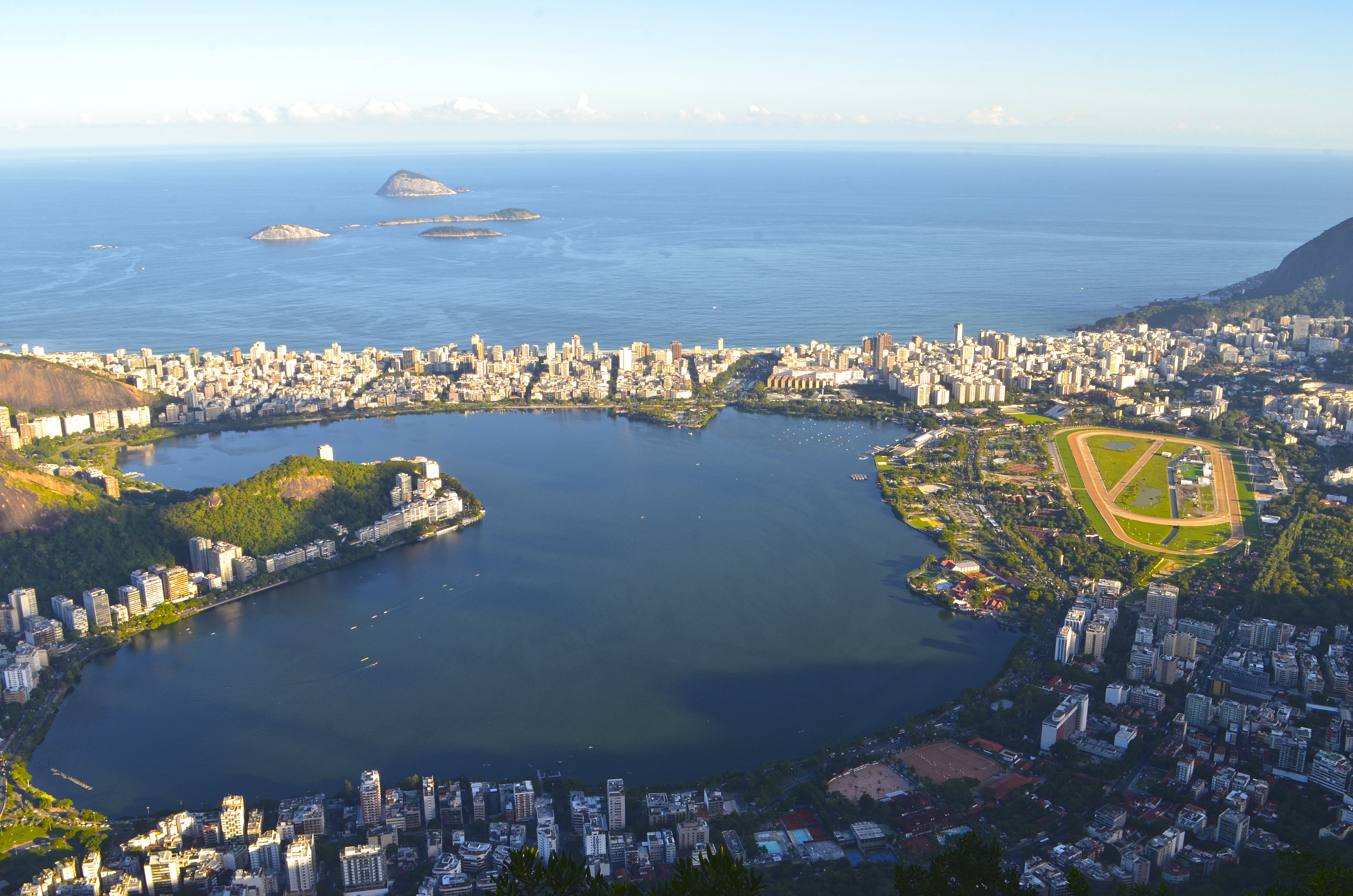 Lagoa Rodrigo de Freitas e Jockey Clube Brasileiro vistos do Cristo Redentor.